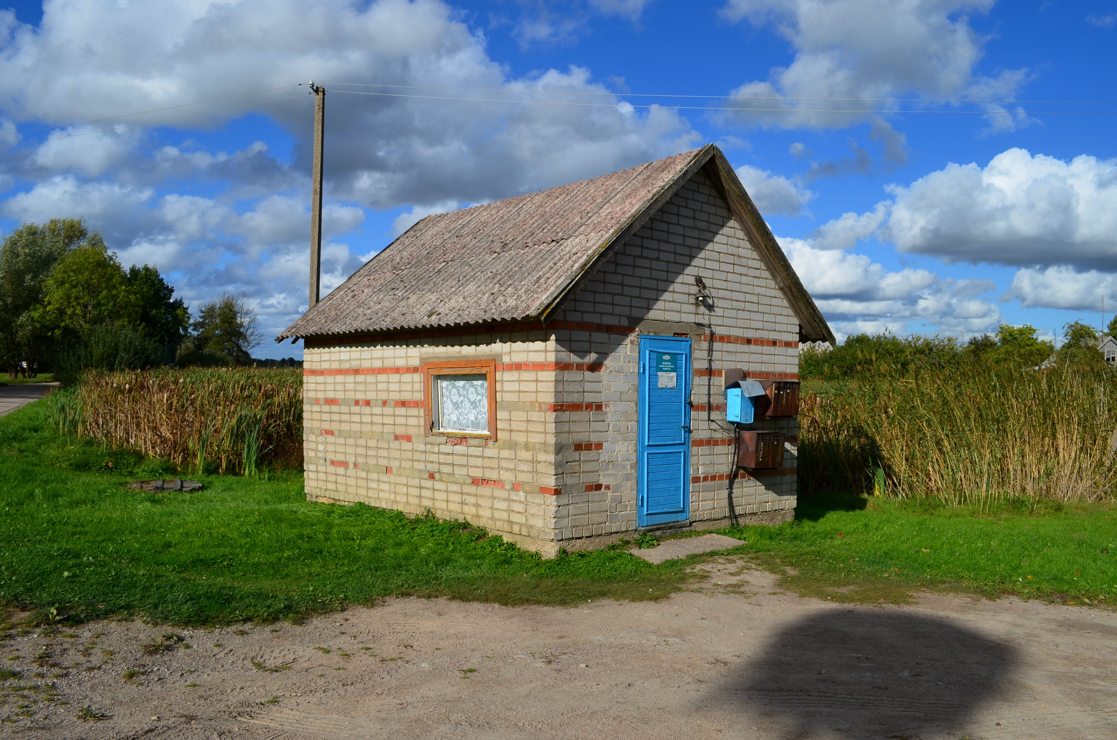 Pieno supirkimo punktas, Kiškių k., Šilutės raj.